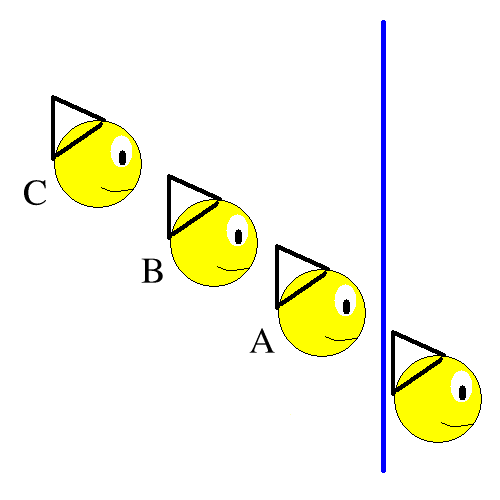 Arestitoj en ĉapeloj por enigmo pri arestitoj kaj ĉapeloj